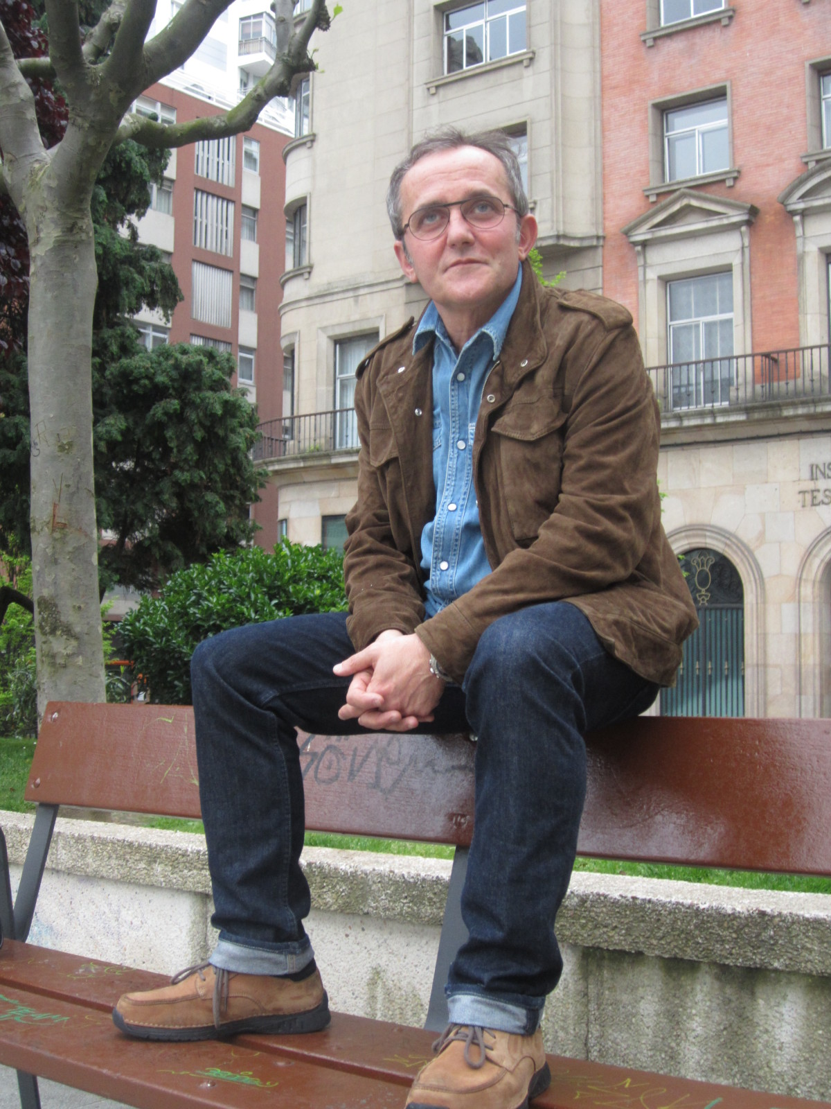 Antonio Durán Morris nunha entrevista por recibir o premio Pedigree 2012 da IX edición do Festival de Cans.